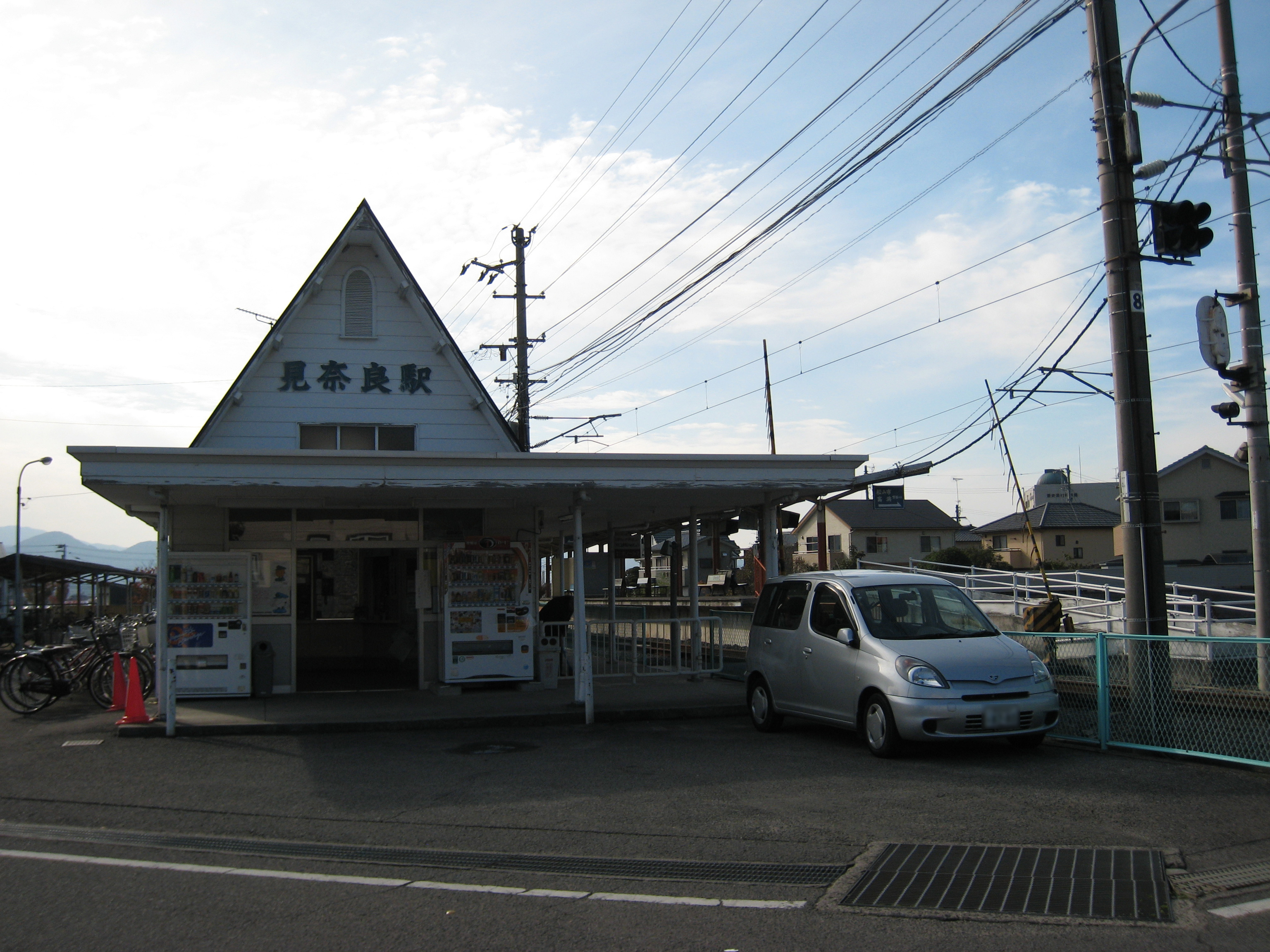 伊予鉄道 見奈良駅